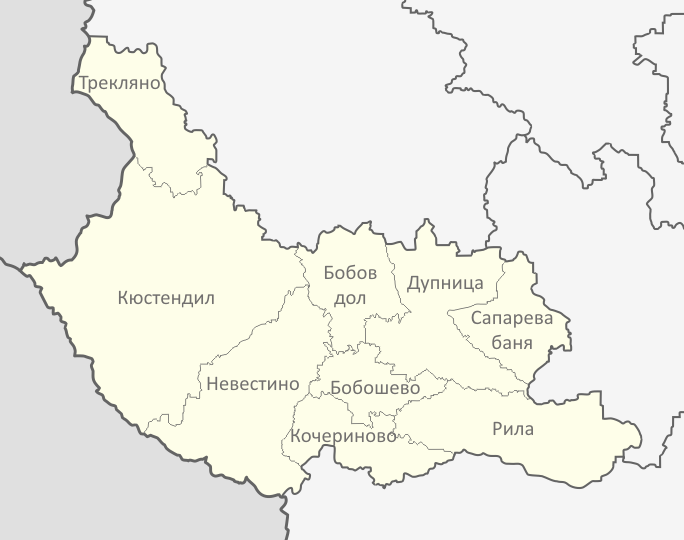 Картата е създадена от Любомир Таушанов